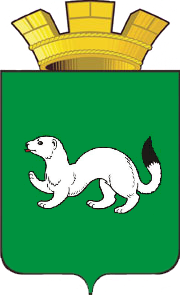 Герб города Тары Омской области